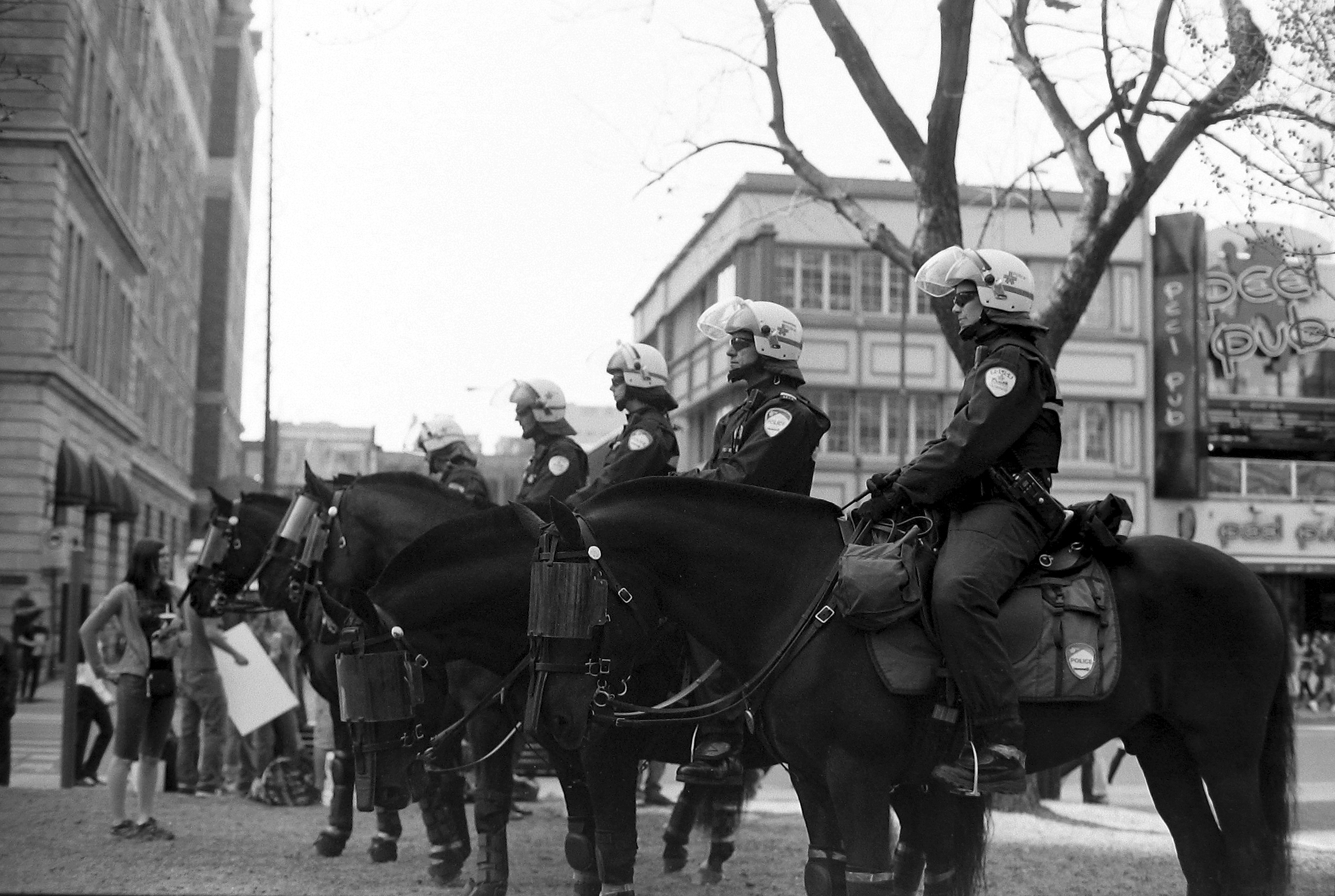 Chevaux de la Police de Montréal à la Manifestation étudiante du 22 mars 2012, Montréal, Québec